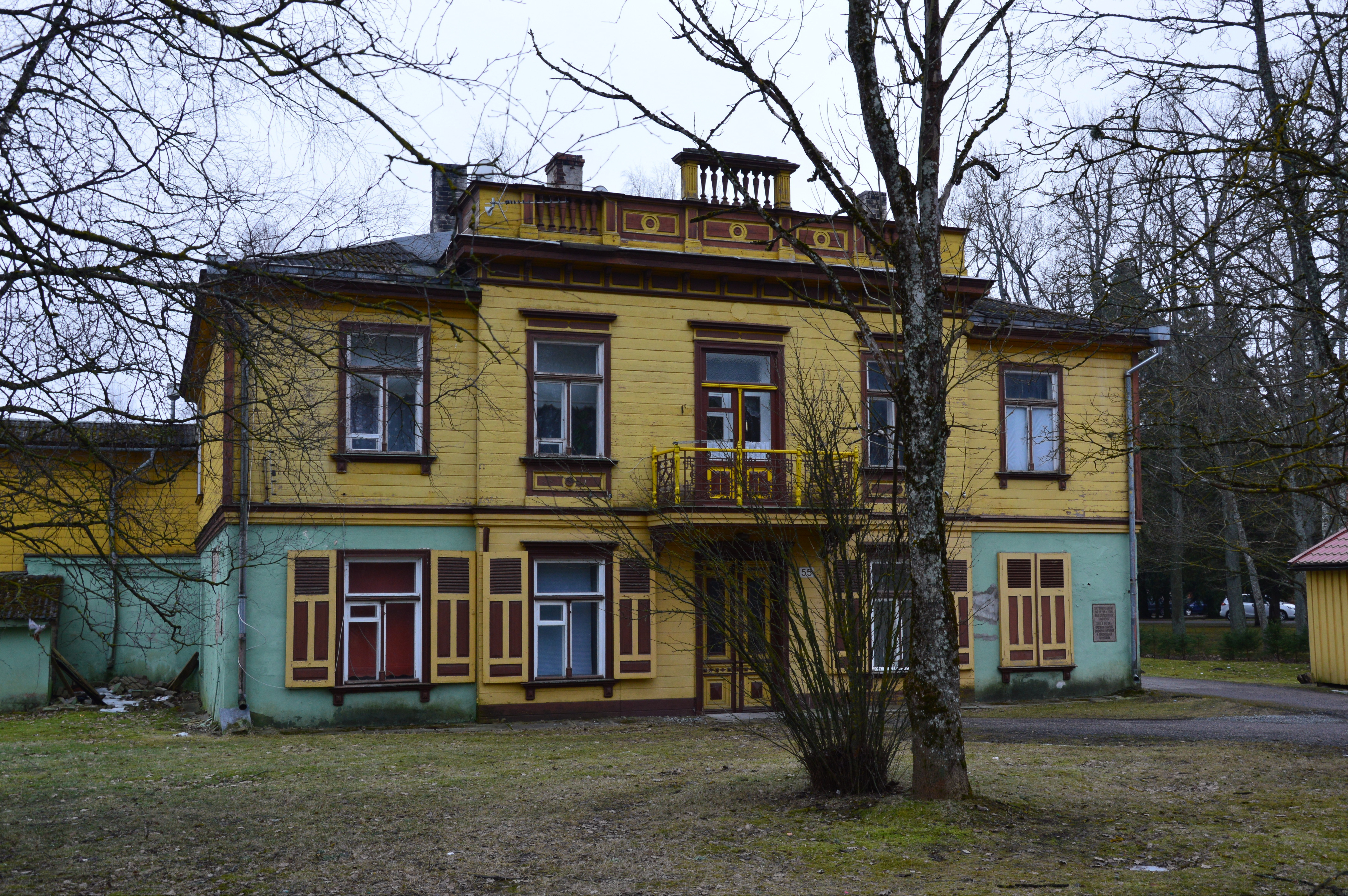 Elamu Sindis Pärnu mnt 55.